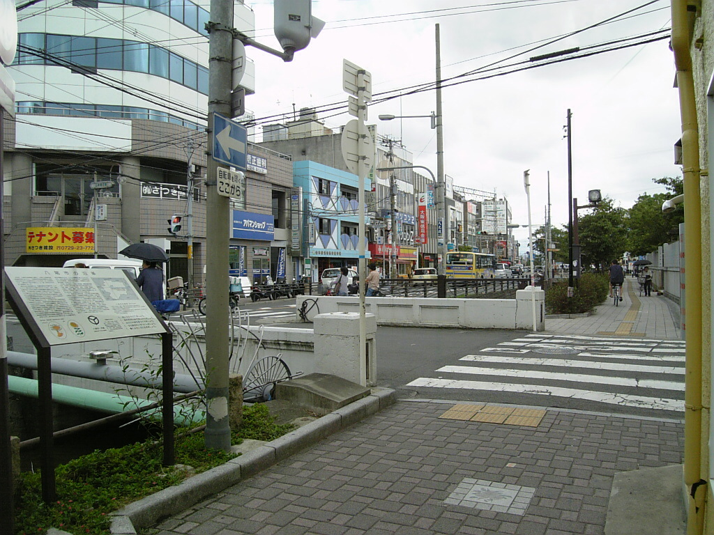 近鉄山本駅北側・山本橋付近（大阪府八尾市）